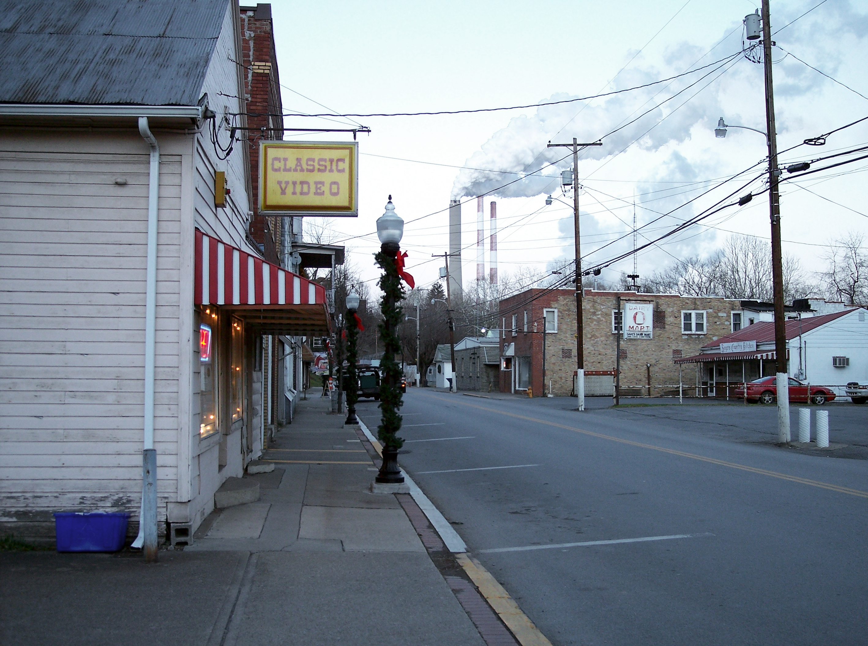 Main Street (West Virginia Route 20) in Lumberport, West Virginia